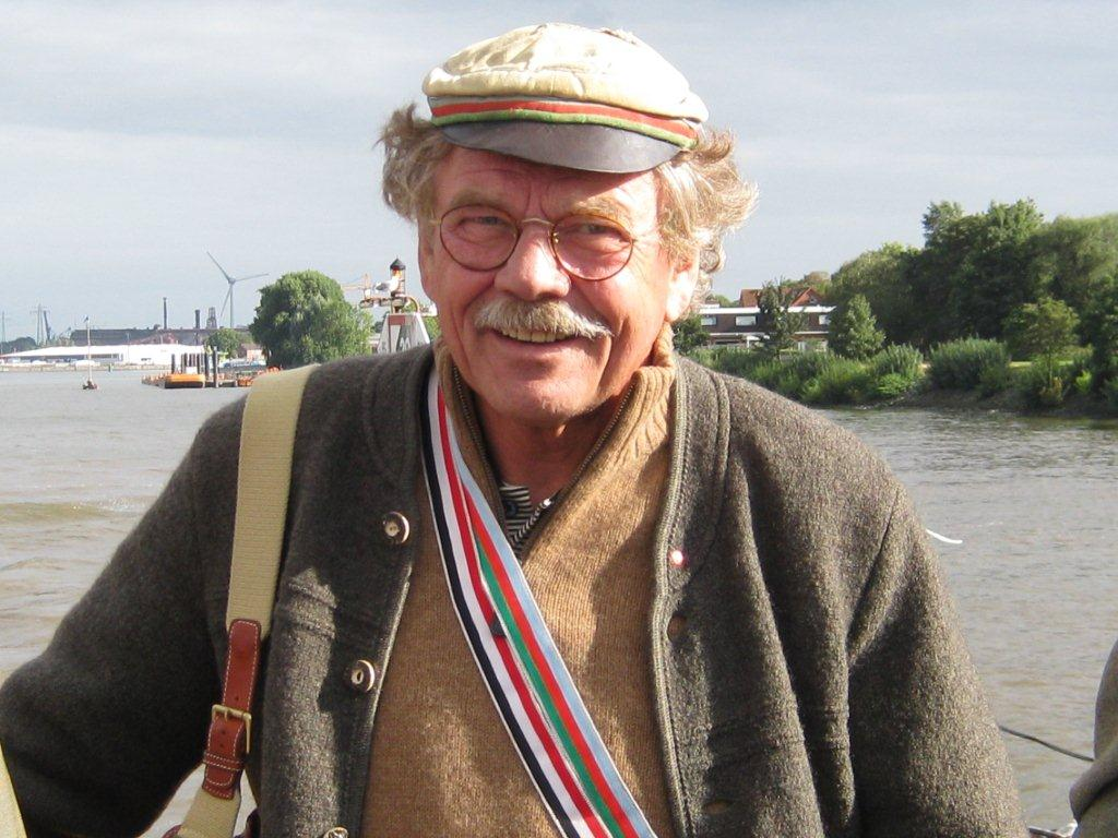 Fotografie von Eberhard C. Schaal, Angehöriger des Corps Albertina Hamburg und des Corps Hansea Bremen (auf der Elbe)